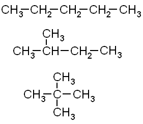 此图像的内容是三种戊烷的结构式。Burea制作并上传。2005年3月25日。